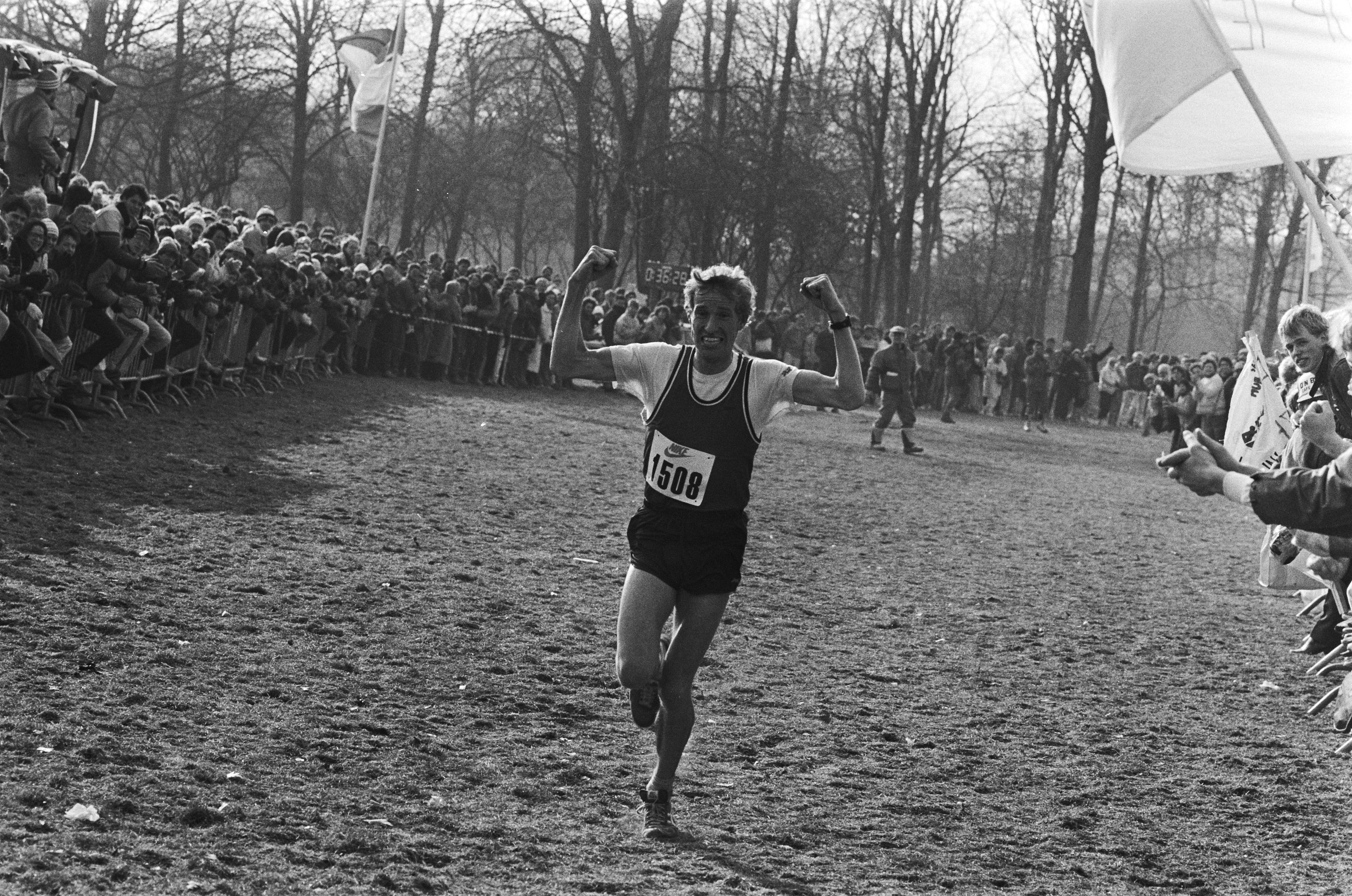 Collectie / Archief : Fotocollectie Anefo Reportage / Serie : Nederlandse Veldloopkampioenschappen in Amsterdamse bos Beschrijving : Tonnie Dirks gaat bij de heren als eerste over de finish Datum : 2 maart 1986 Locatie : Amsterdam, Noord-Holland Trefwoorden : veldlopen Persoonsnaam : Dirks, Tonnie Fotograaf : Bogaerts, Rob / Anefo, [onbekend] Auteursrechthebbende : Nationaal Archief Materiaalsoort : Negatief (zwart/wit) Nummer archiefinventaris : bekijk toegang 2.24.01.05 Bestanddeelnummer : 933-5812